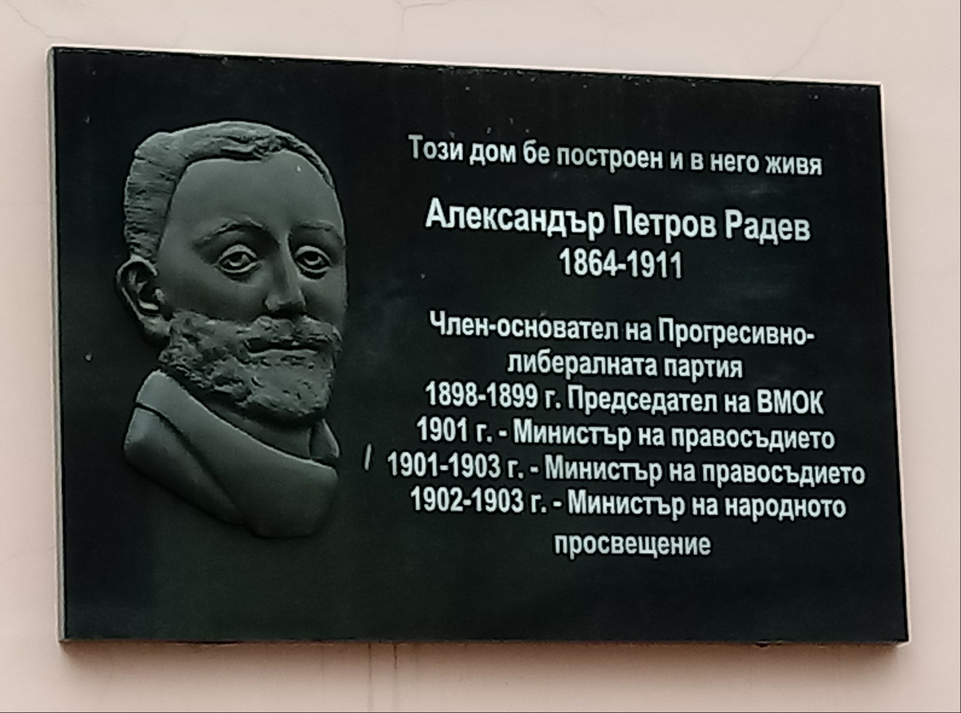 Alexander Radev memorial plaque, 56 Solunska Str., Sofia